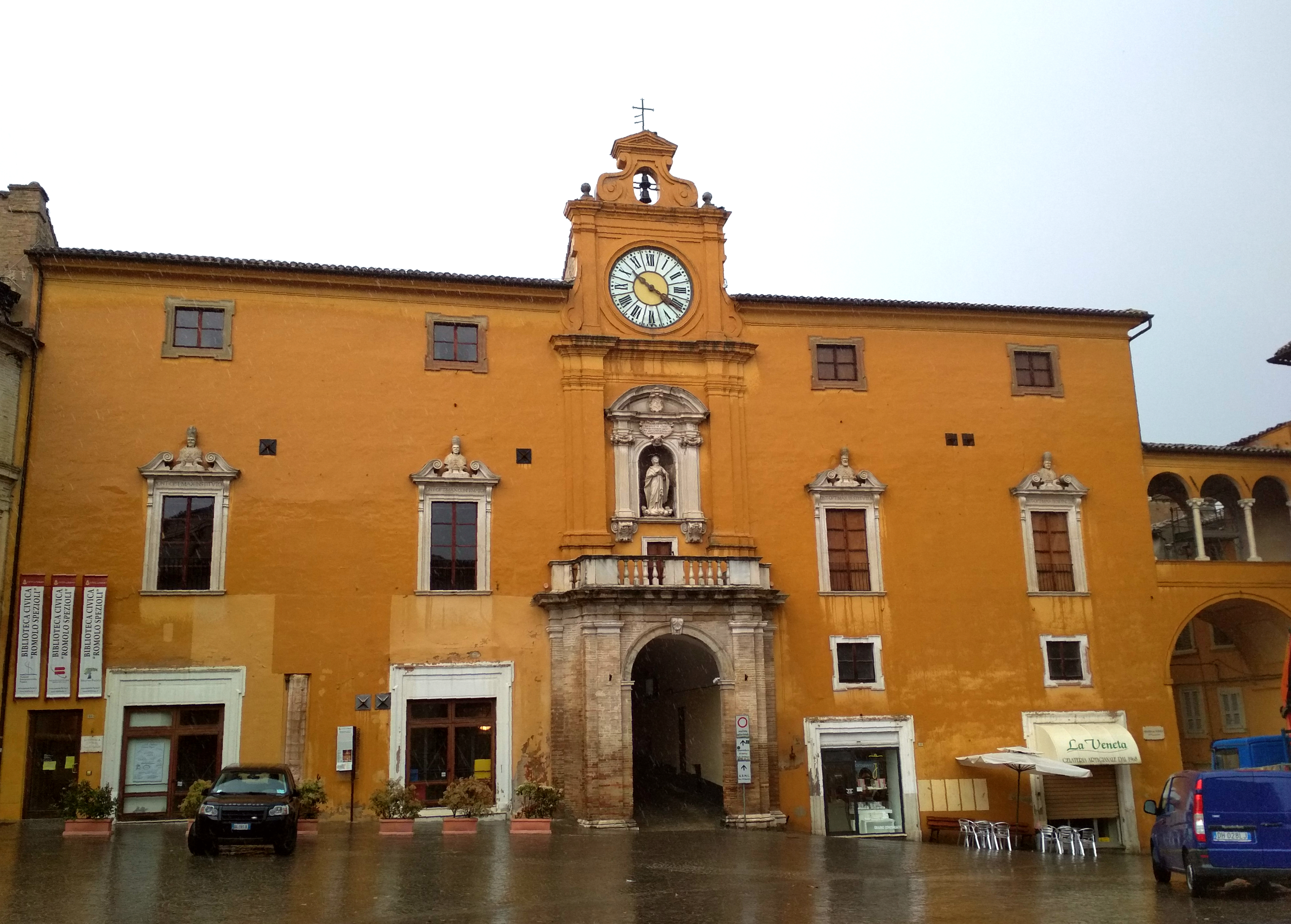 Facciata del Palazzo degli Studi, sede della Biblioteca civica "Romolo Spezioli" di Fermo